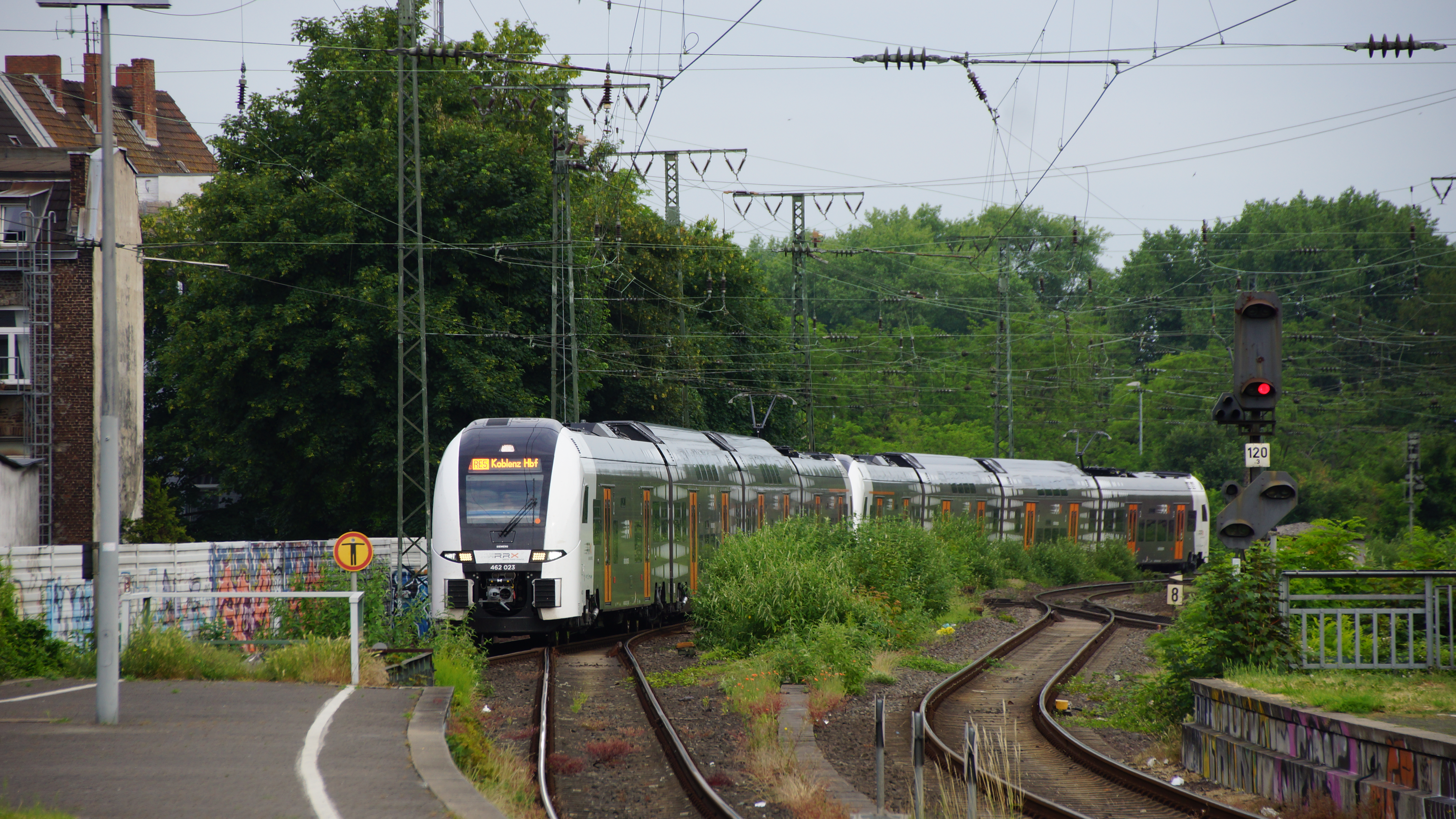 Bahnhof Köln Süd Gleis 1 mit Einfahrt RRX-Zug RE5 Rhein-Express, Siemens Desiro HC 462023 und 462029, Richtung Bonn